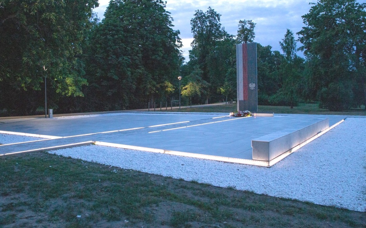 Stargard. Pomnik patriotyczny Stargardzianie Ojczyźnie